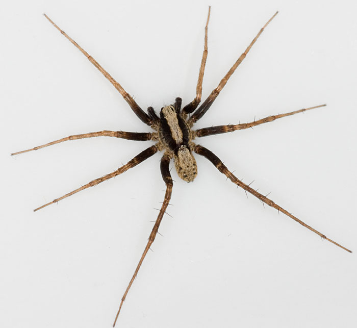 Pardosa lugubris adult male